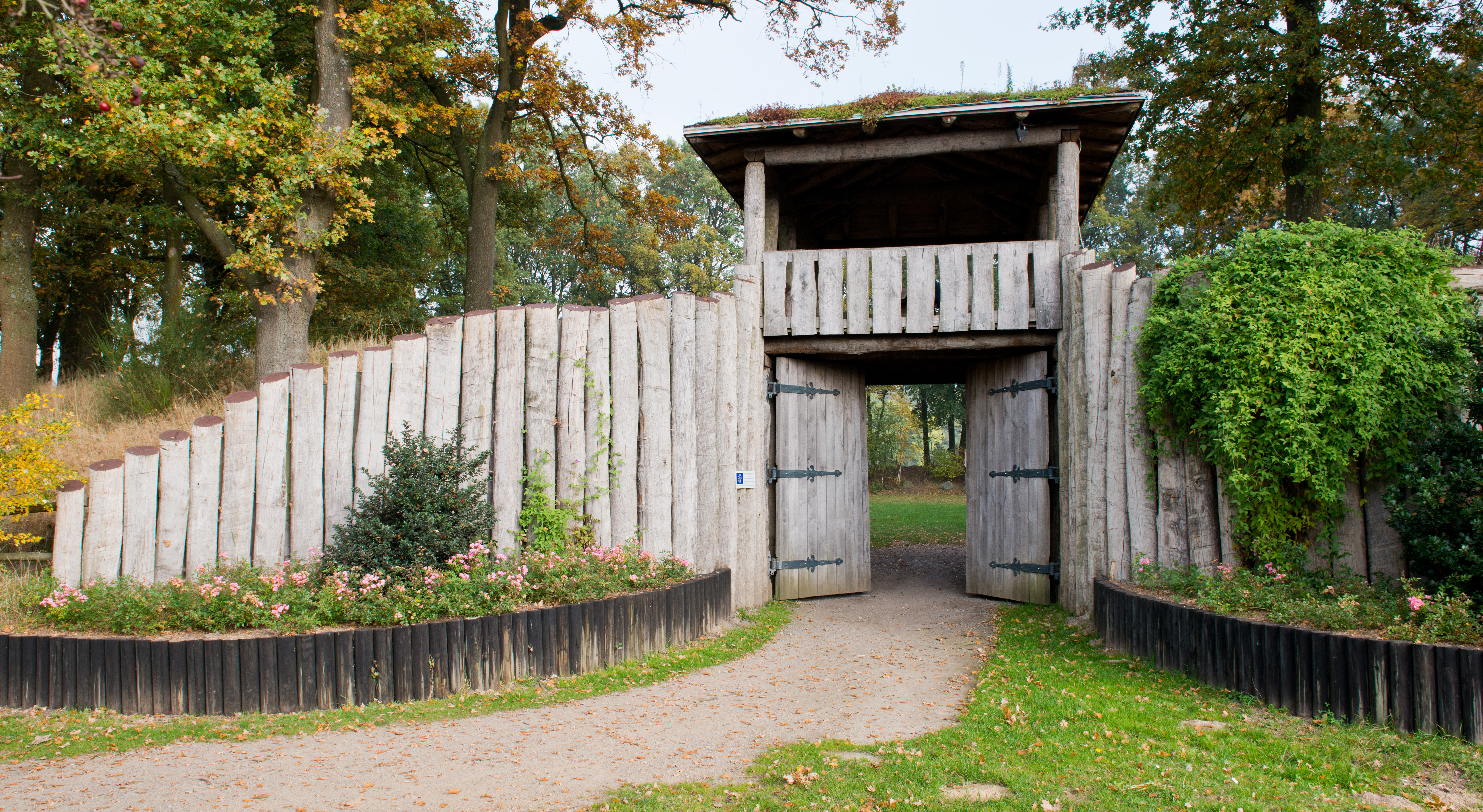 Baudenkmal in Twistringen Scharrendorf Ringwall Hünenburg